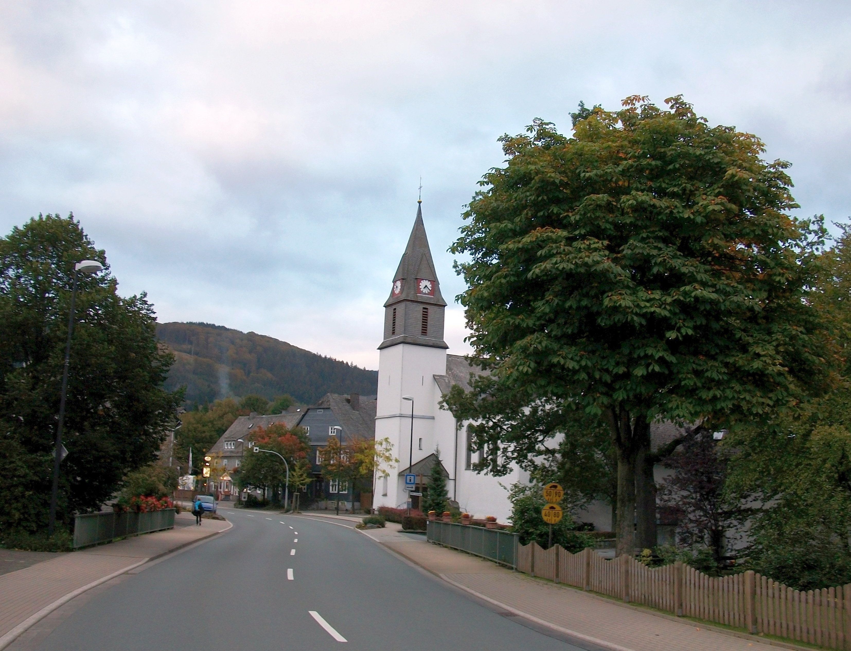 Winterberg-Niedersfeld (Germany), katholische Kirche St. Agatha.